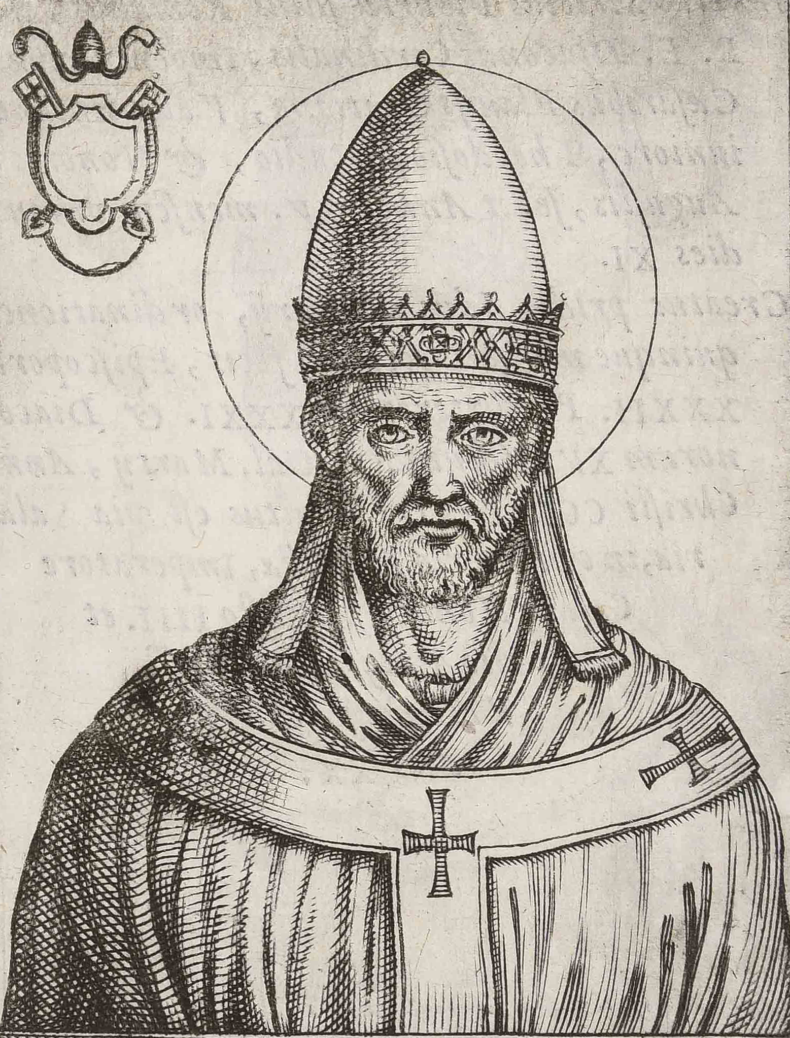 Portrait imaginaire de Damase Ier par Giovanni-Battista Cavalieri in Pontificum Romanorum effigies, Roma, Basa Domenico\Zanetti Francesco, 1580